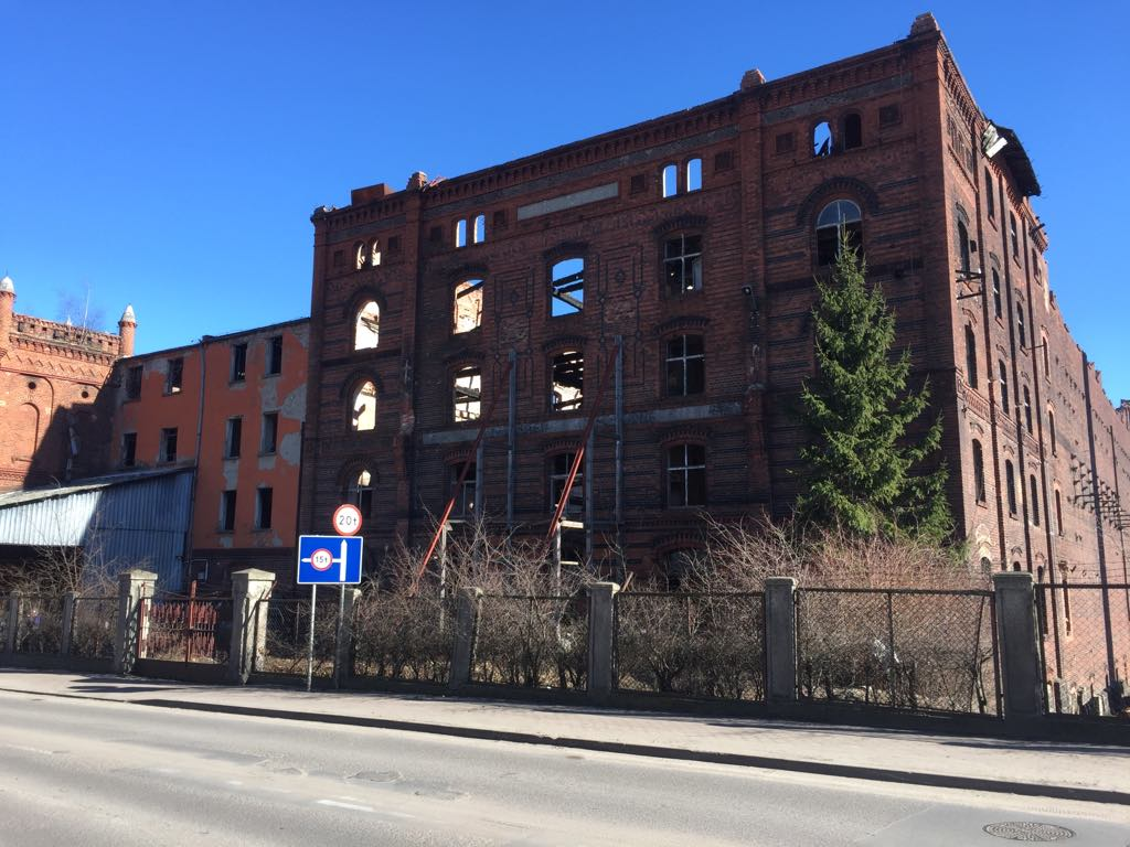 Młyny, Starogard Gdański